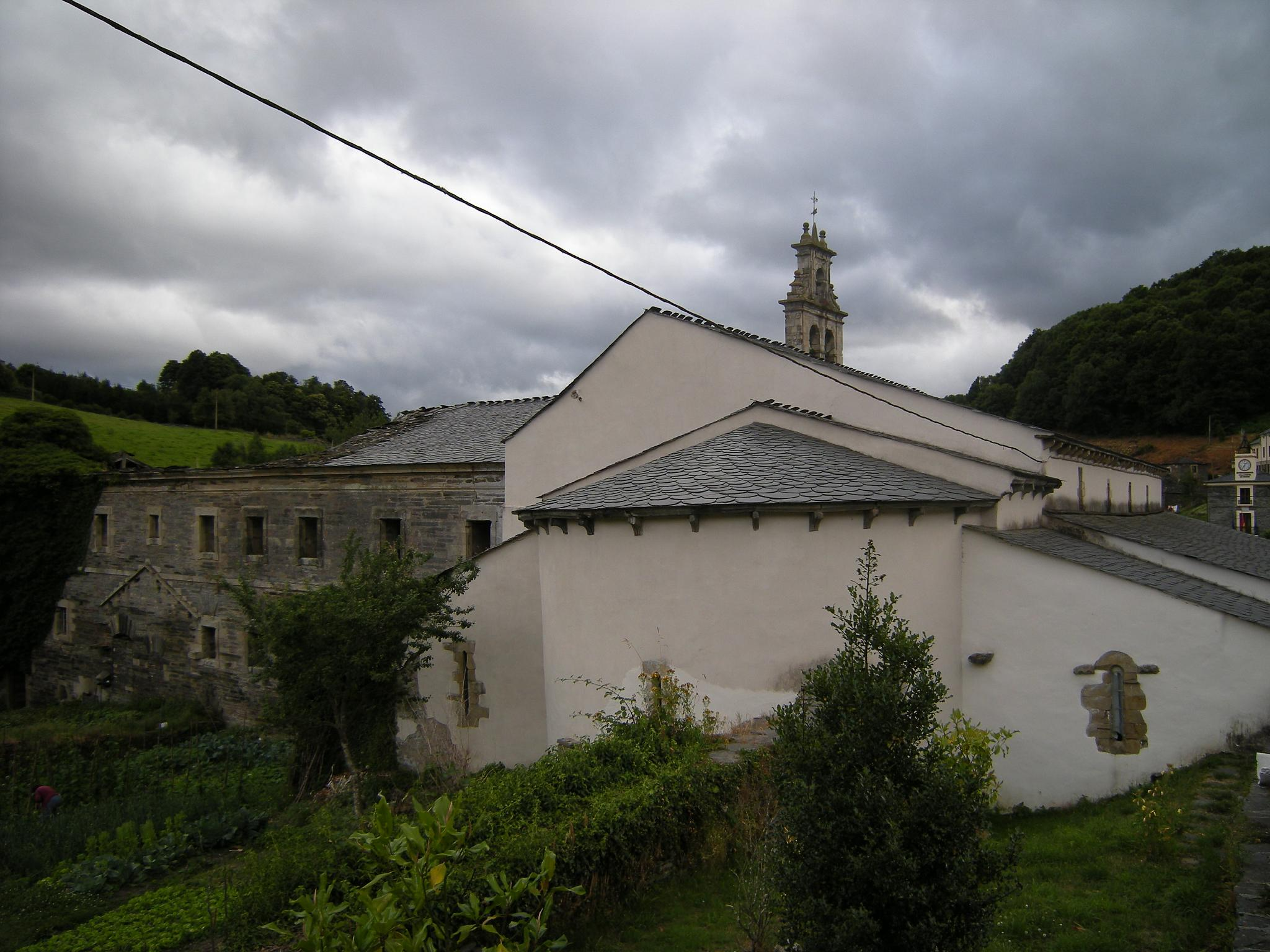 Cabecera de la iglesia.